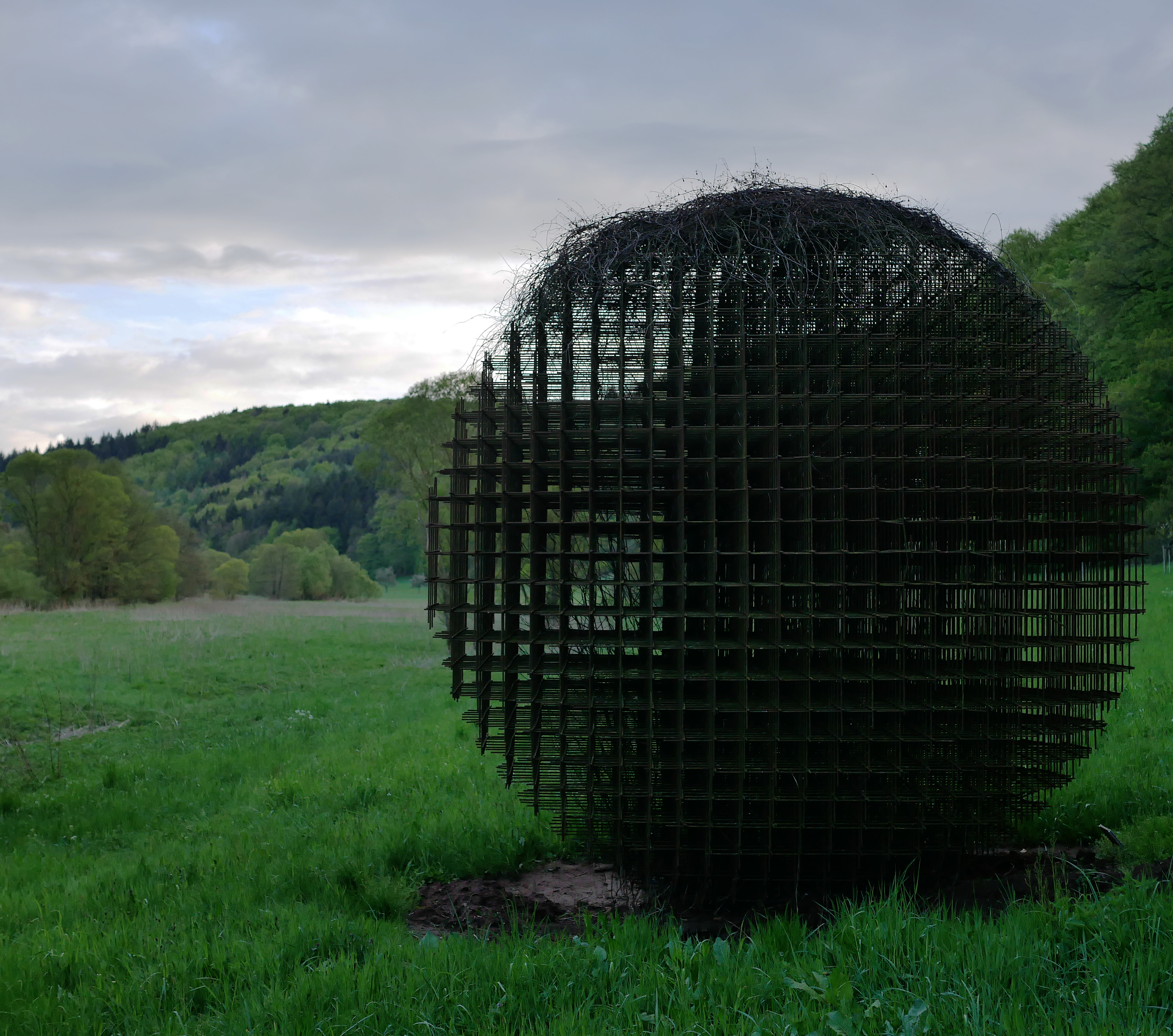 Werner Bitzigeio 2007 - Die Stahlarbeit in Tawern soll wie ein natürliches Phänomen wirken, dem man sich nähern kann, um zu fühlen, um bewegt, vielleicht begeistert zu sein – sie strahlt Würde aus und beeindruckt durch ihre Kraft. Entstanden im Rahmen des Bildhauersymposiums 2007 in Konz